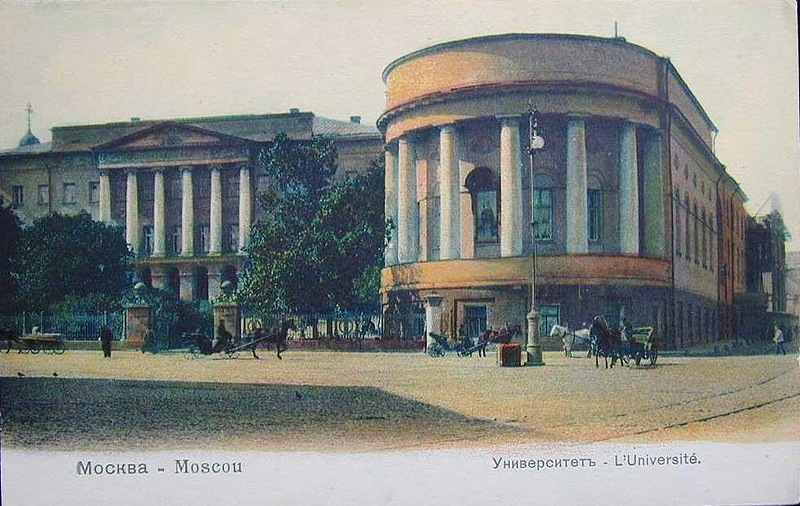 Второе здание Московского университета на Моховой - Аудиторный корпус.